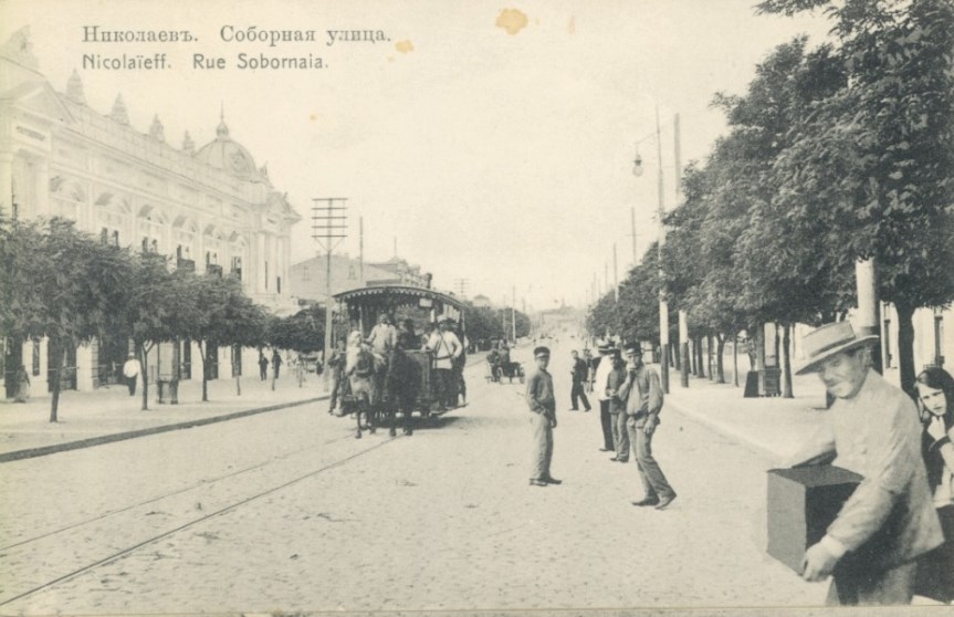 Соборная улица